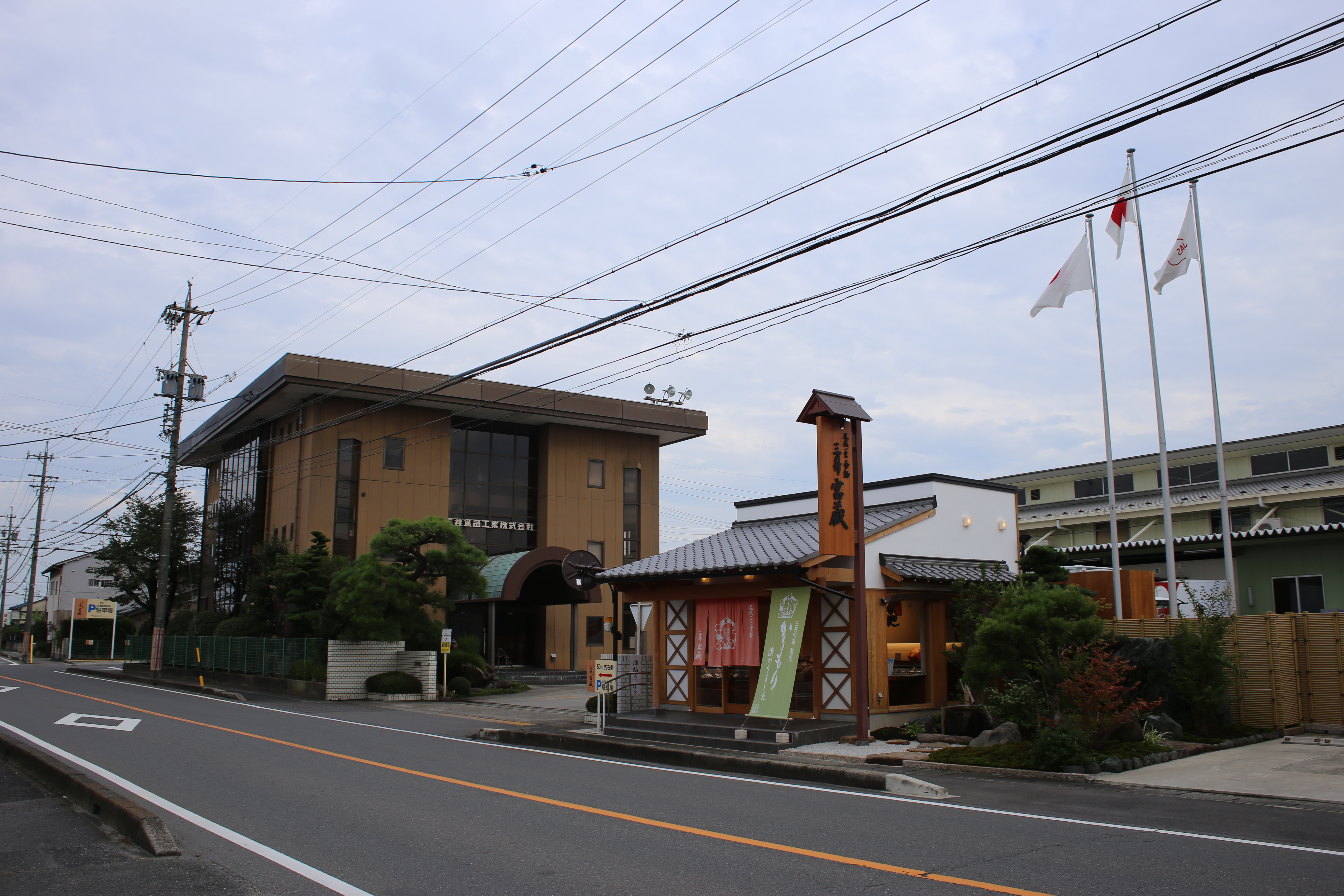 愛知県一宮市三ツ井の三井食品工業本社を北側公道西側より撮影